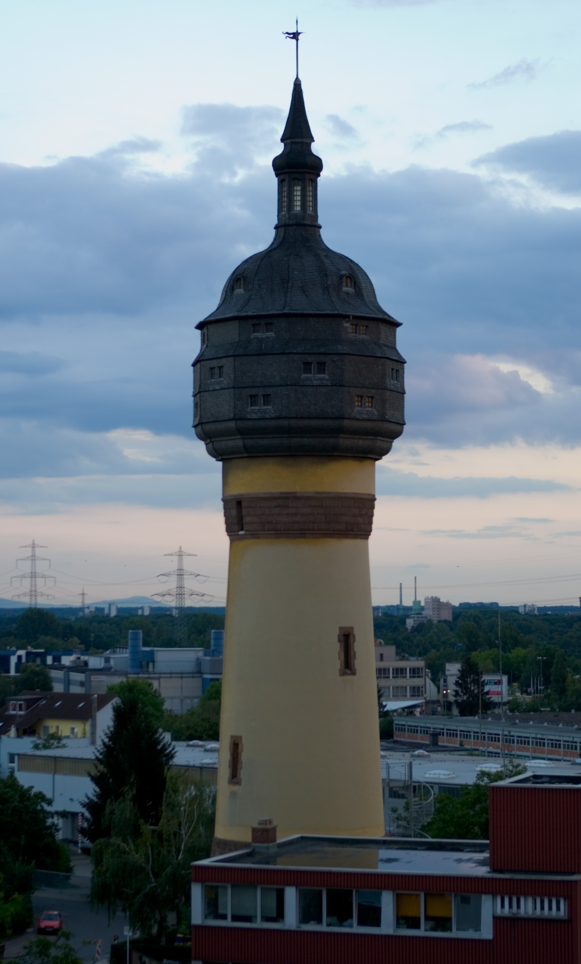 Rödelheimer Wasserturm, erbaut 1897, 51 m hoch, als Trinkwasserspeicher für nahe Wohngebiete Ort:Frankfurt am Main